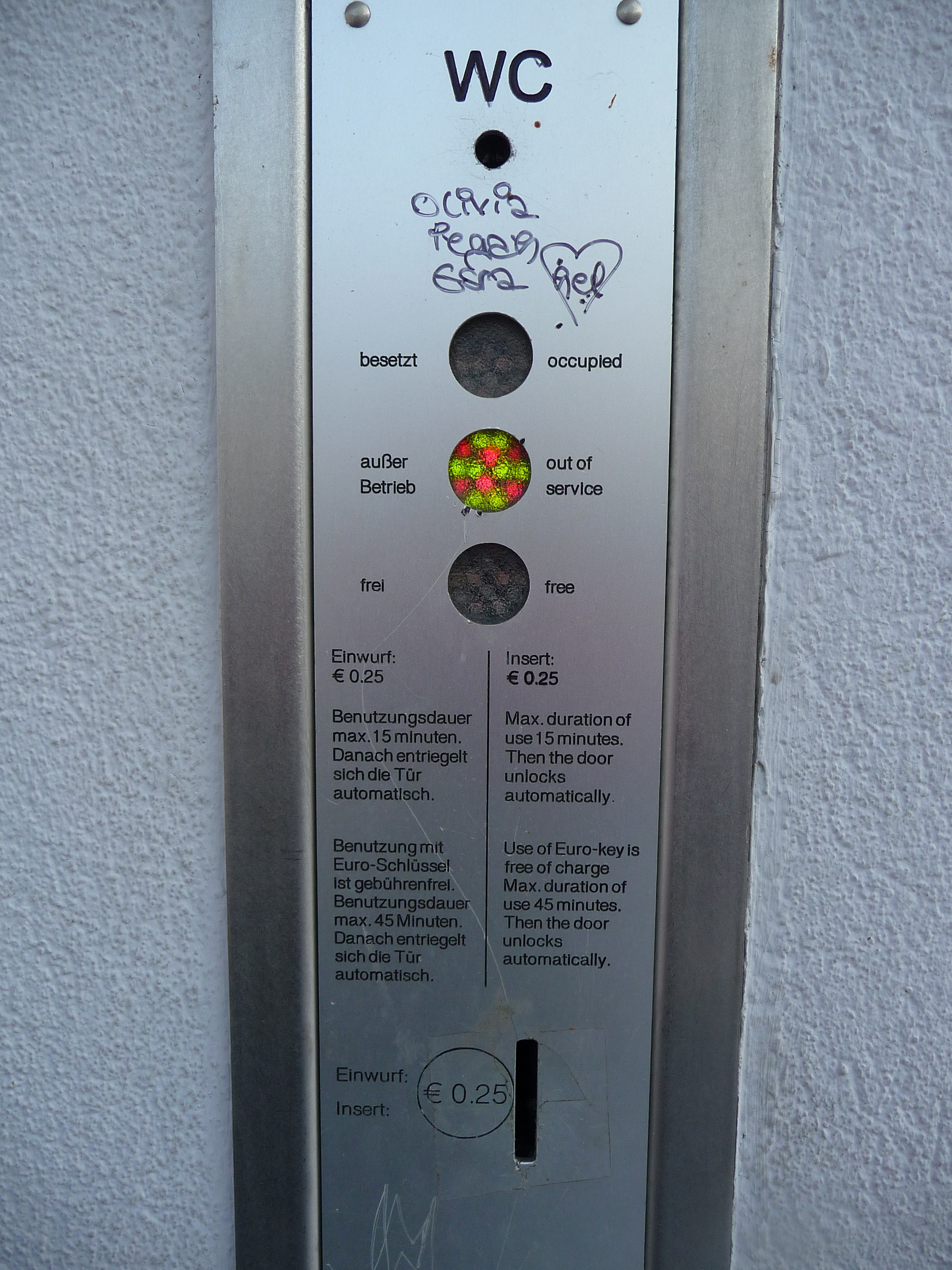 automatische WC-Anlage, Münzeinwurf und Hinweise